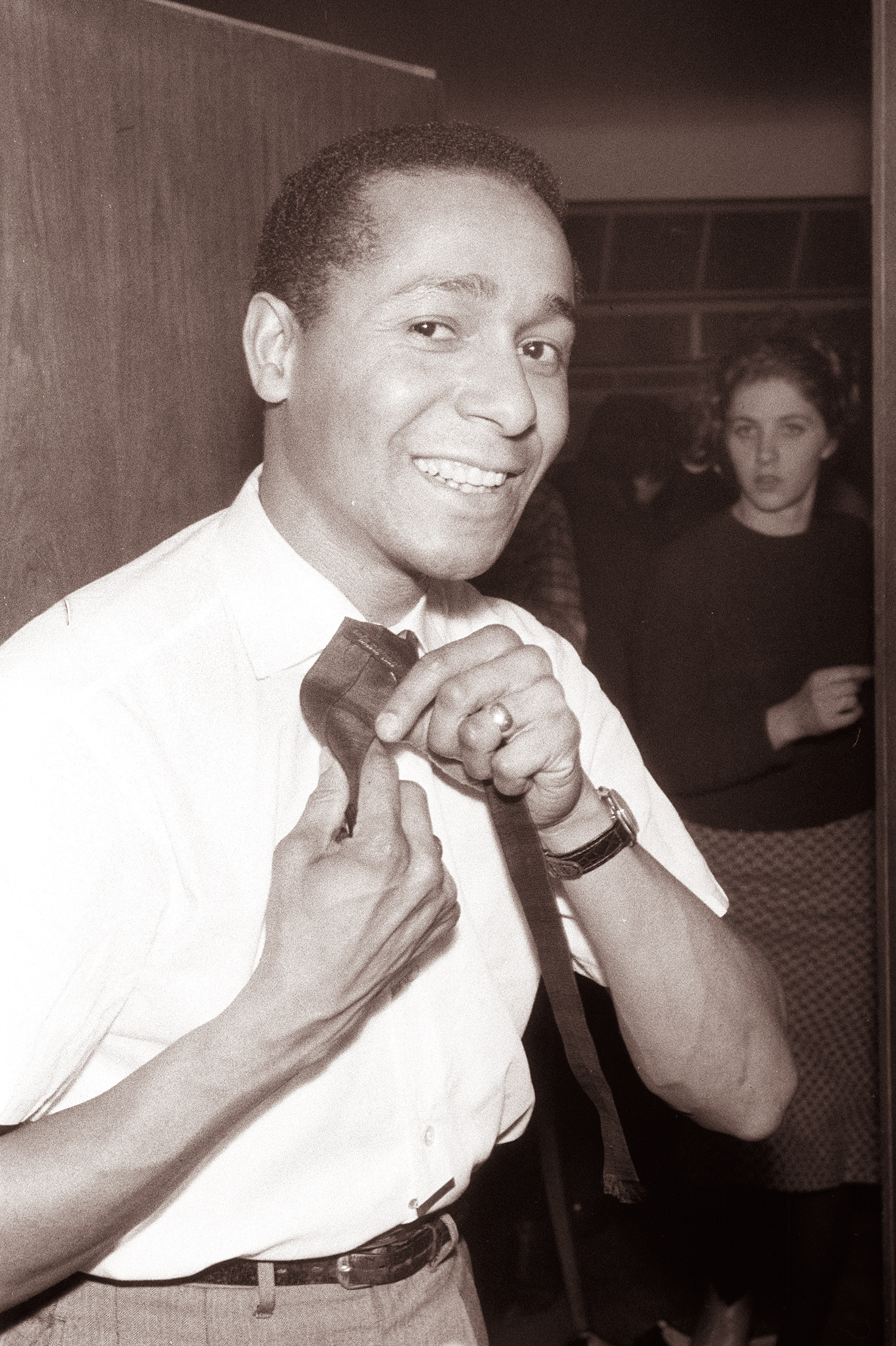 Artur Duncan v Kidričevem